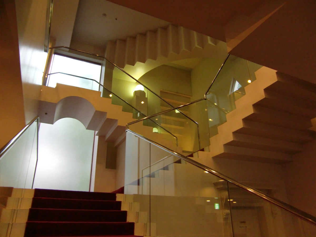 ヴィラフィンテーヌ六本木アネックス（旧六本木プリンスホテル）ロビー横の階段